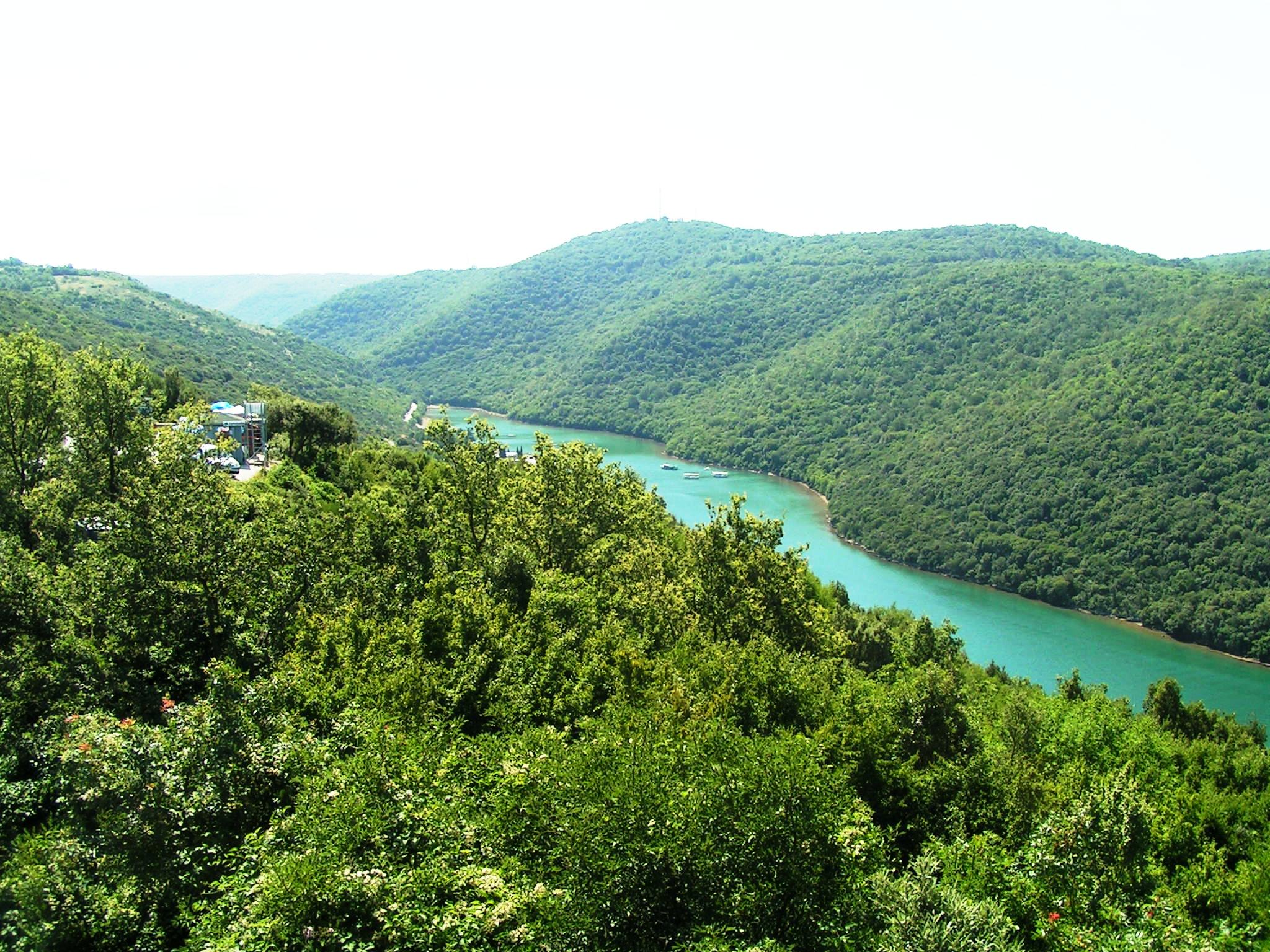 Kroatien Limski Fjord